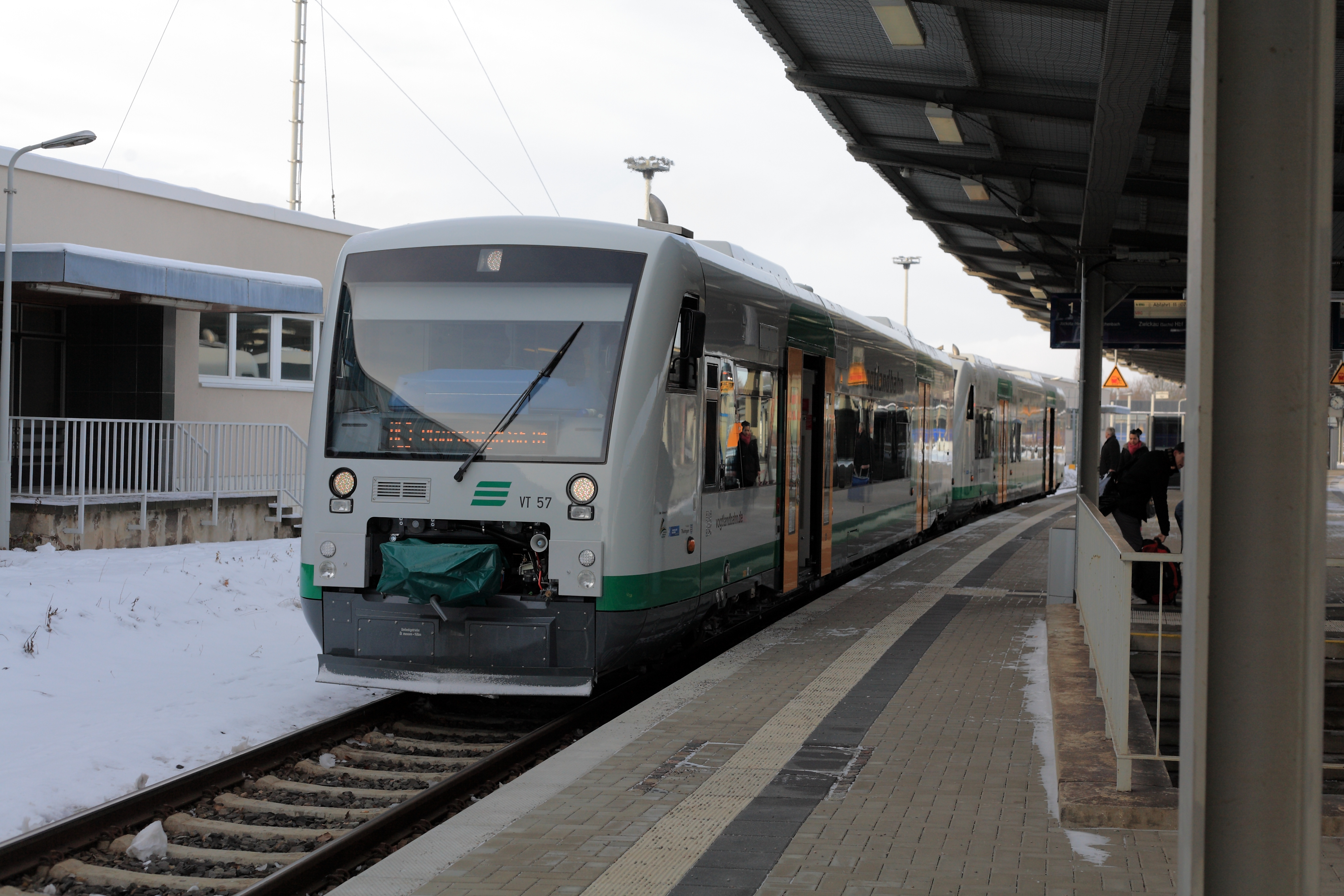 Regionalzug nach Zwickau Hbf. Die durch die schlechten Anschlüsse bedingten langen Übergangszeiten ermöglichen zumindest gute Möglichkeiten zum fotografieren. Die 650 der Vogtlandbahn sind als Nachfolger der »Regiosprinter« 653 für Fahrten bis Zwickau Zentrum ebenfalls nach BO Strab ausgerüstet.